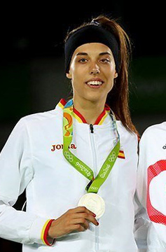 مدال‌آوران وزن 57 کیلوگرم مسابقات تکواندوی المپیک 2016 ریو دو ژانیرو. نفر اول: جید جونز از انگلستان، نفر دوم: اوا گومز از اسپانیا، سوم مشترک: کیمیا علیزاده از ایران و هدایه ملاک وهبه از مصر.